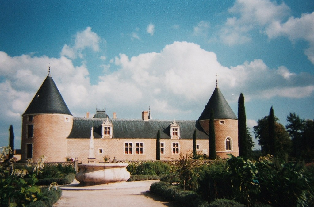 Château de Chamerolles (France)